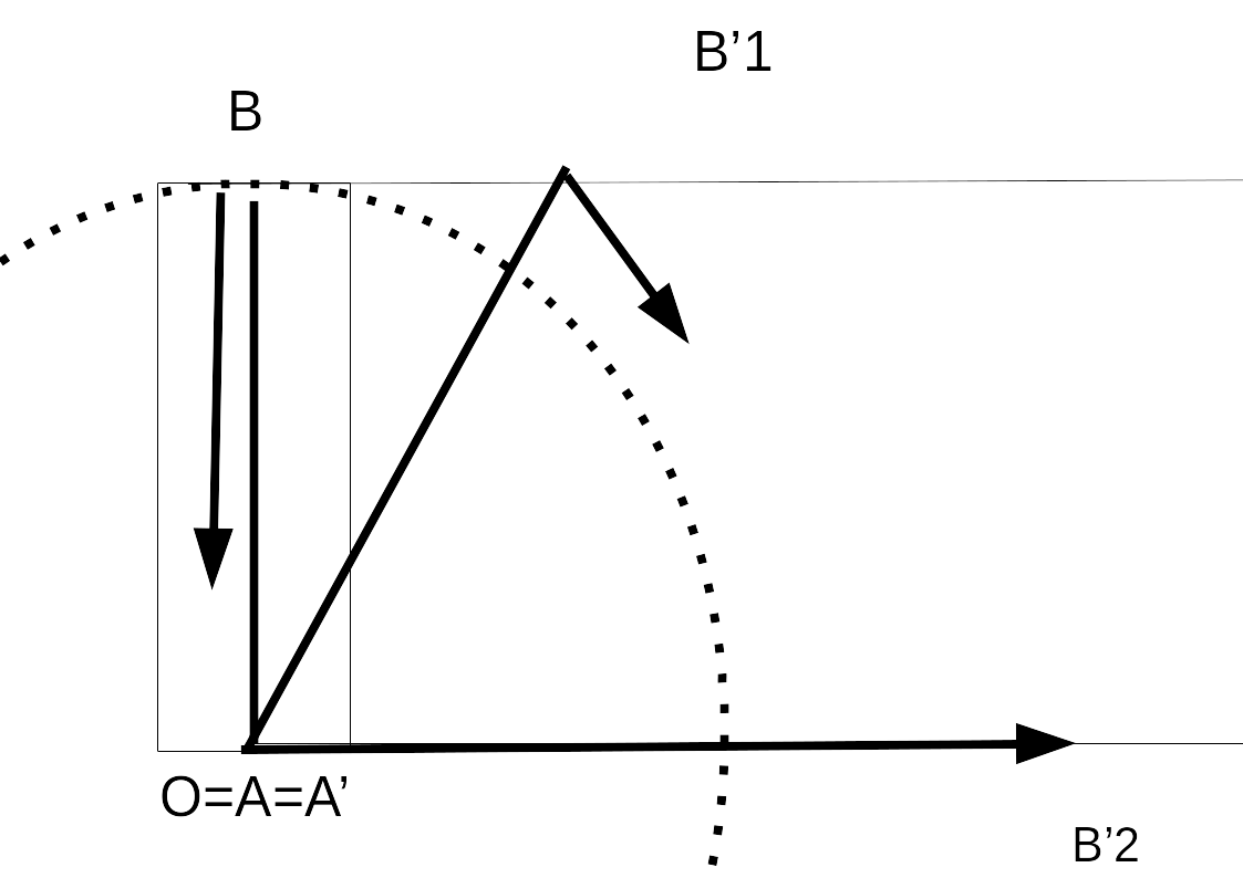 Double Pendule à photon, horizontale et verticale en mouvement.